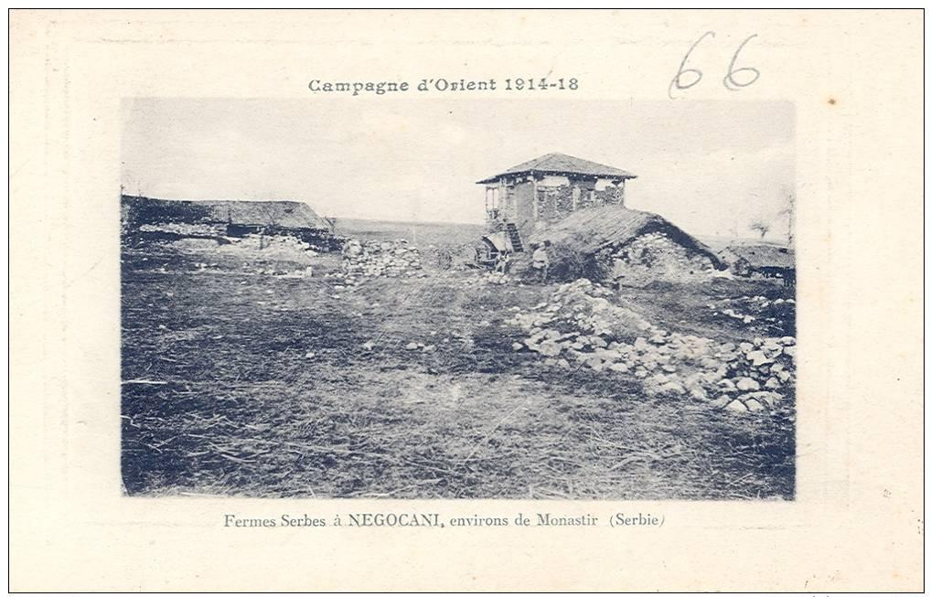 Къщи в Негочани през Първата световна война